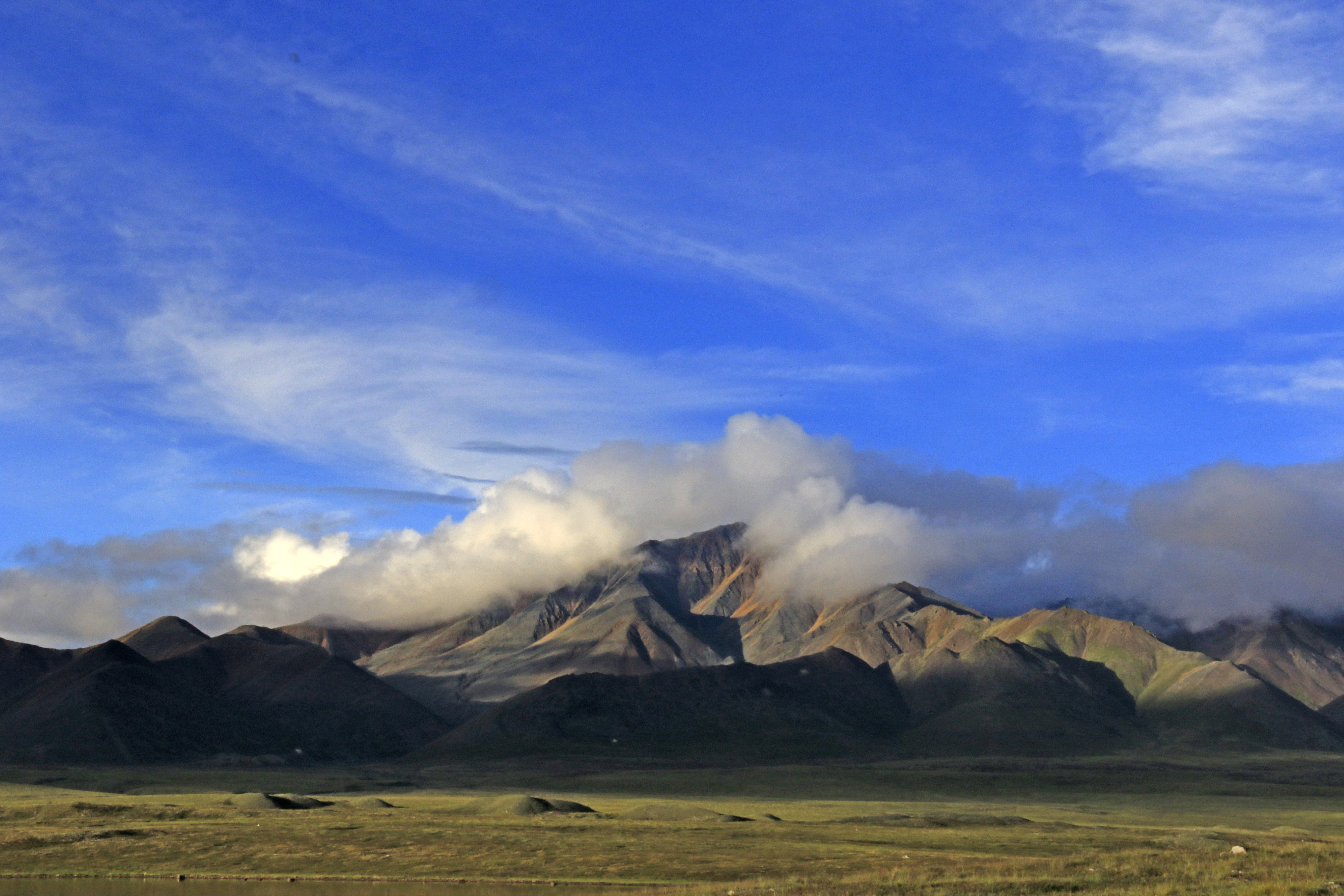 Момский: Расположен в восточной части Момо-Селенняхской впадины и охватывает собой территорию верхней части бассейна реки Момы, включая Буордахский горный массив с пиком г. Победа (3 003 м), Момский район, Якутия (Саха) This image is related to the protected area of Russia number 1410127